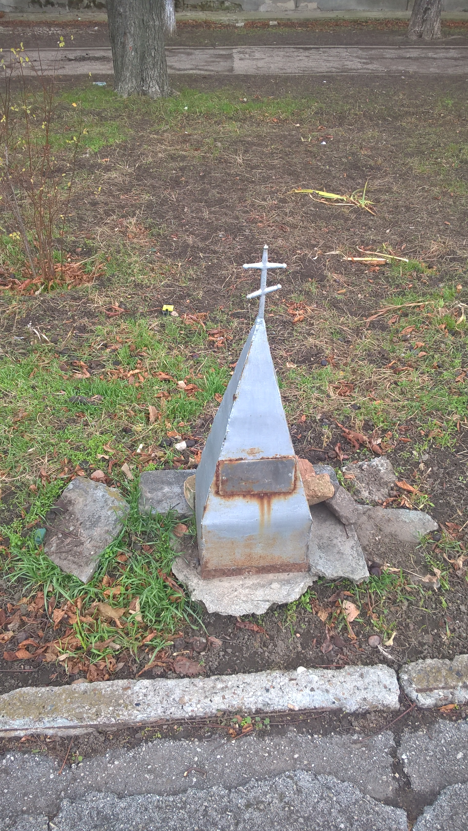 Krzyż na postumencie ku czci ofiarom bitwy w czasie wojny o Naddniestrze